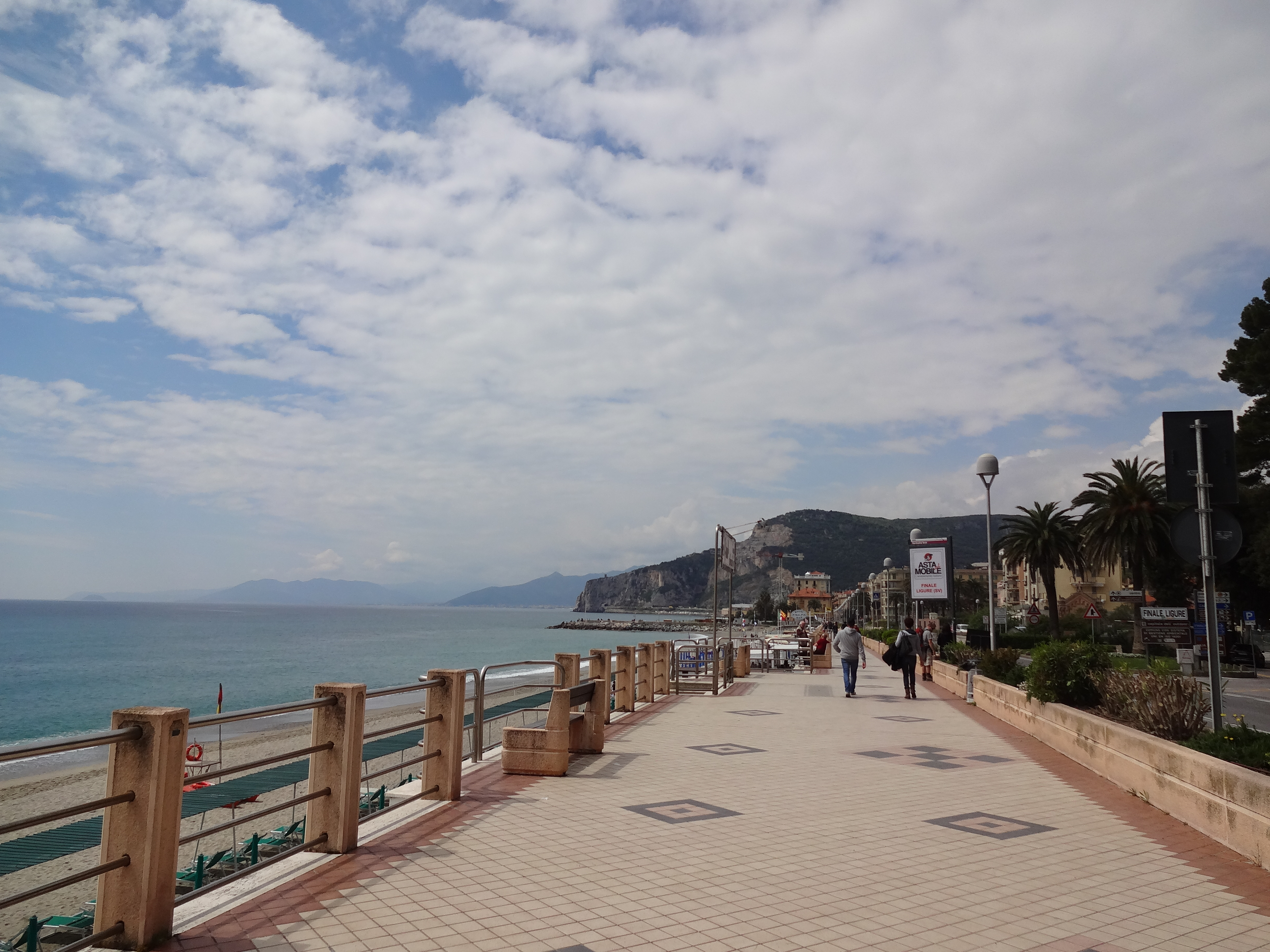 Lungomare di Finale Ligure Pasqua 2014